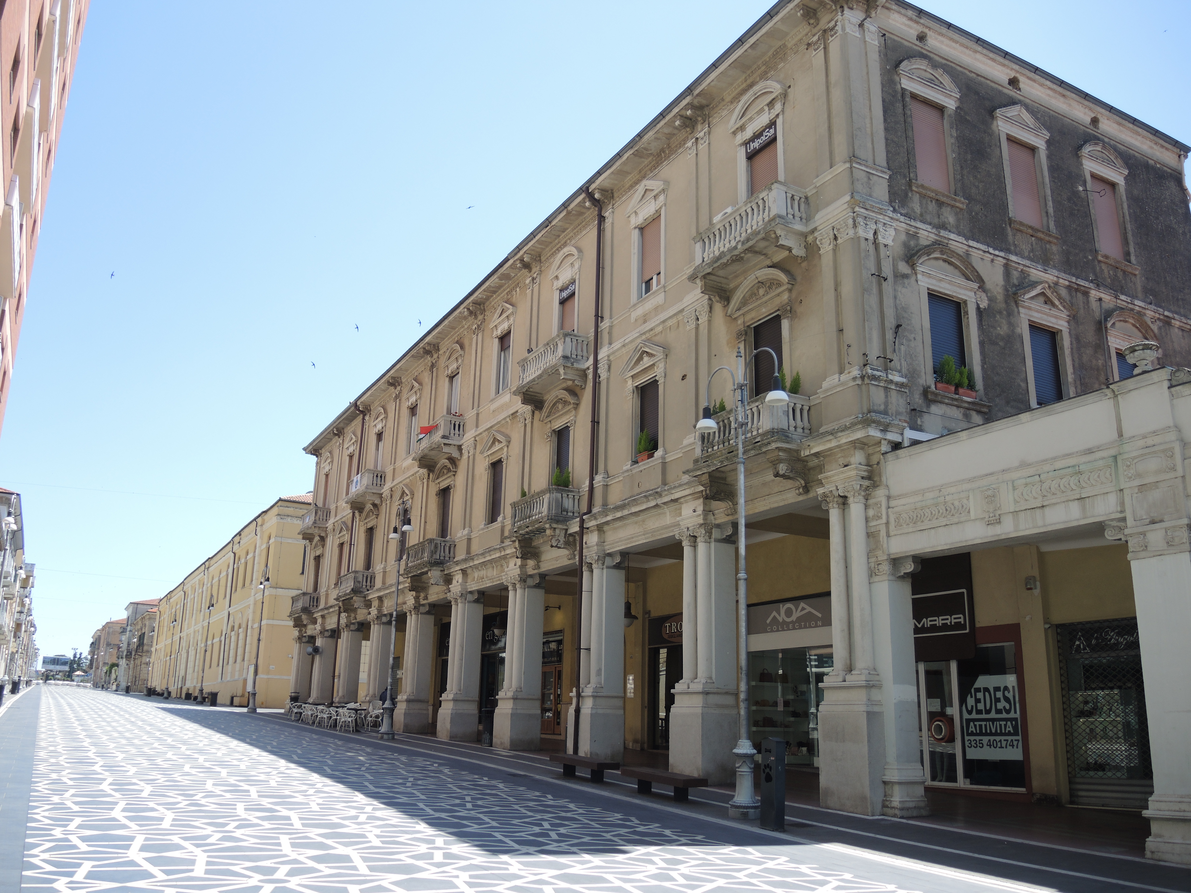 Lanciano